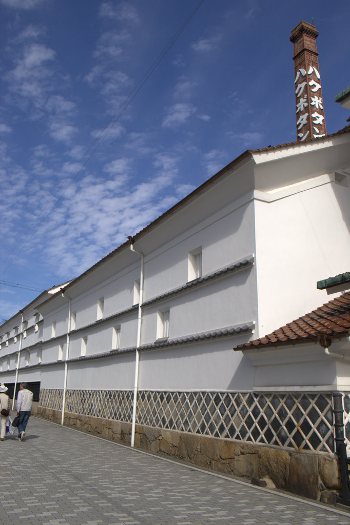 酒蔵通り 白牡丹 Sake brewery "Hakubotan"